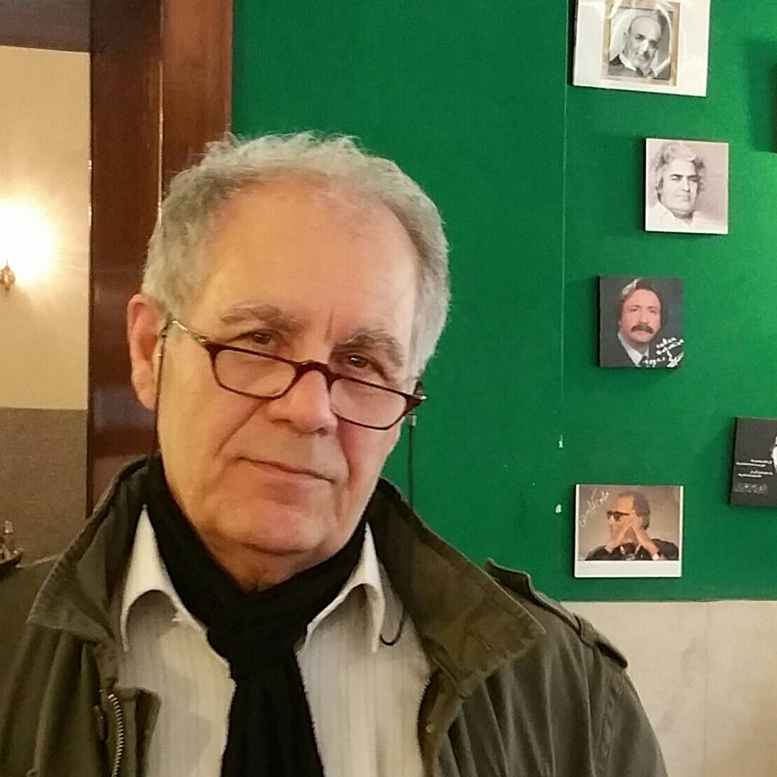 Teheran Café Naderi